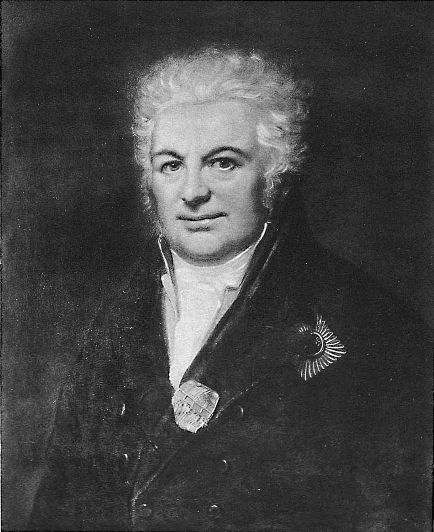 Князь Василий Васильевич Долгорукий (Долгоруков) (1752—1812), генерал-поручик, действительный тайный советник, был женат на княжне Екатерине Фёдоровне Барятинской (1769—1849).